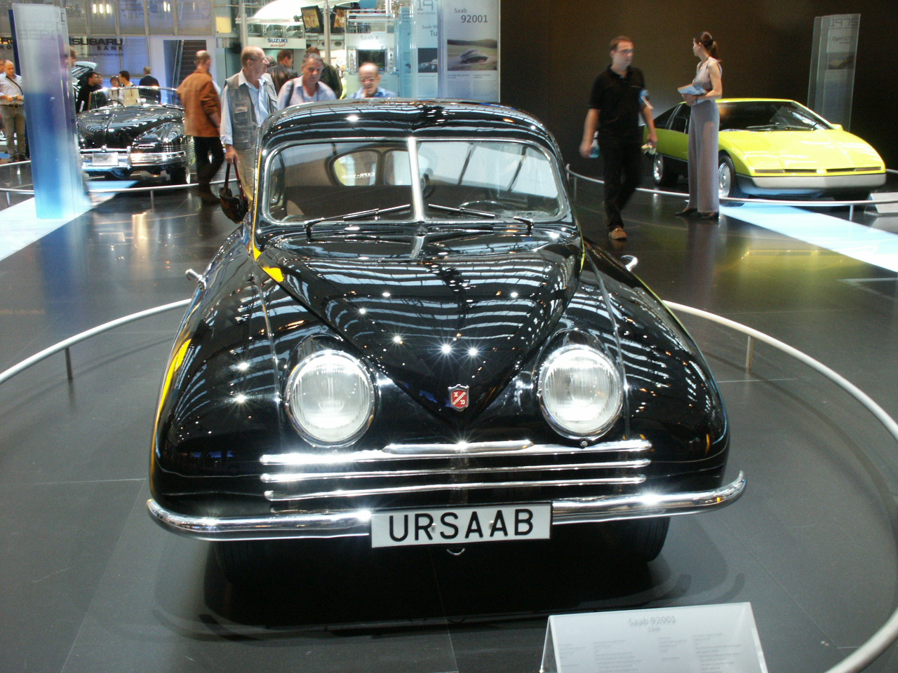 Saab 9200